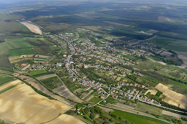 Súr látképe légifelvételen